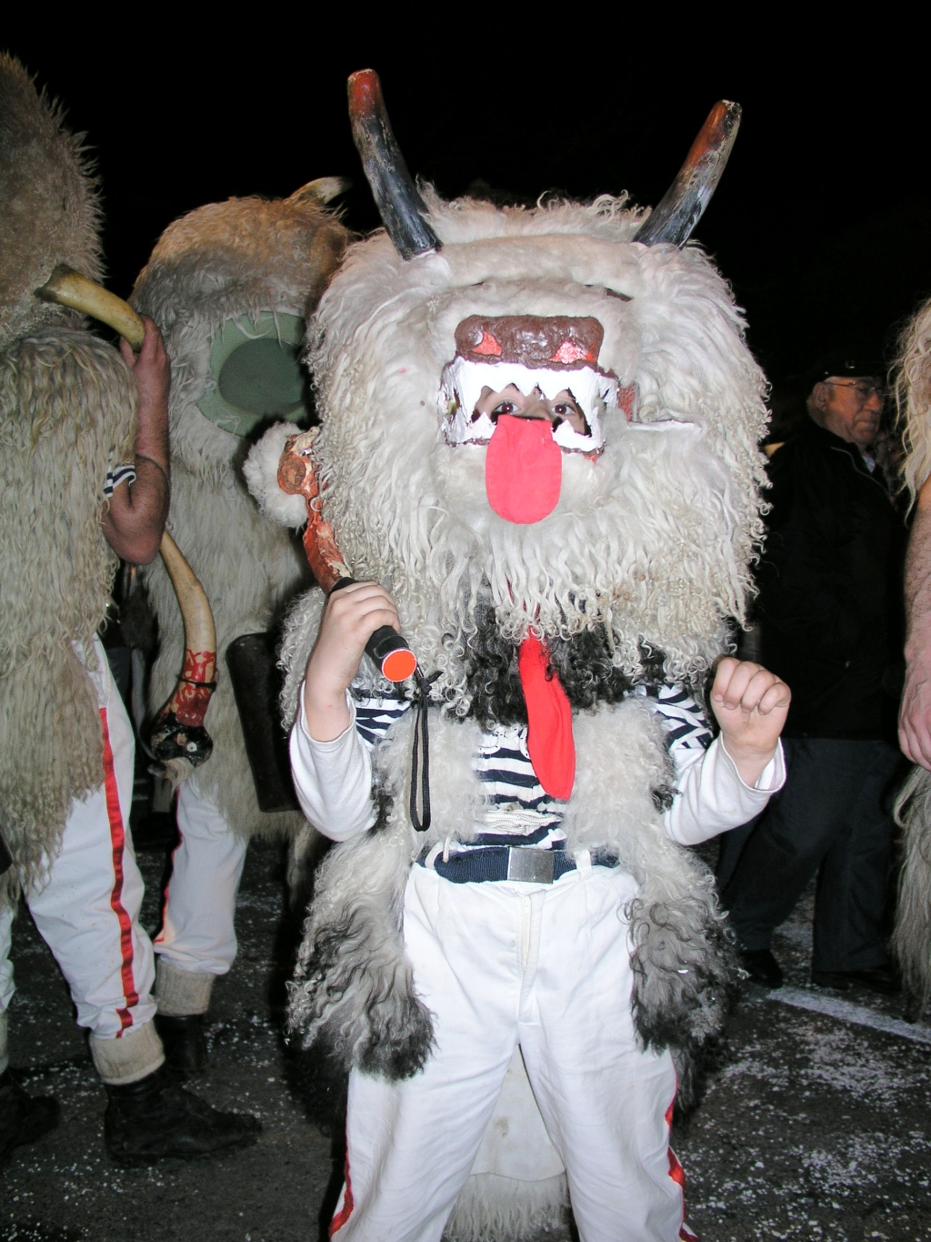 Halubajski zvončari, Viškovo, Hrvatska